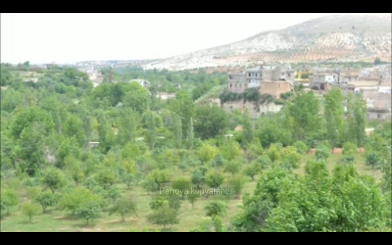 Iklim olarak Akdeniz iklimi bölgeye hakimdir.